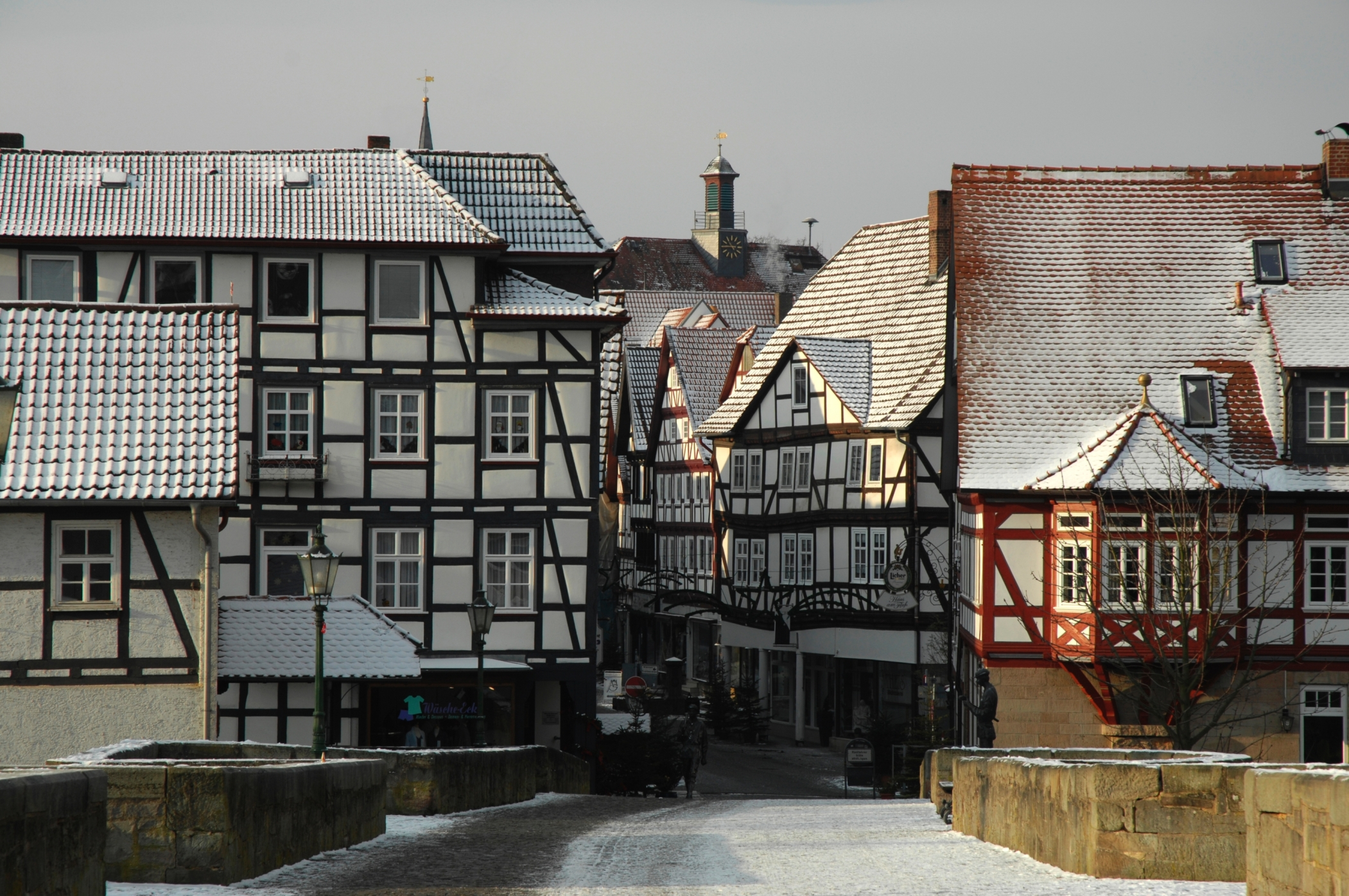 Melsungen, Blick von der „Bartenwetzer Brücke“ in die Altstadt